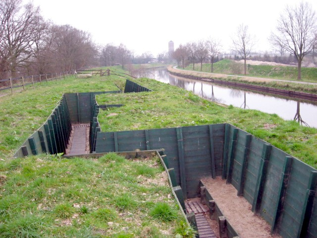 Grebbelinie met loopgraven bij Scherpenzeel